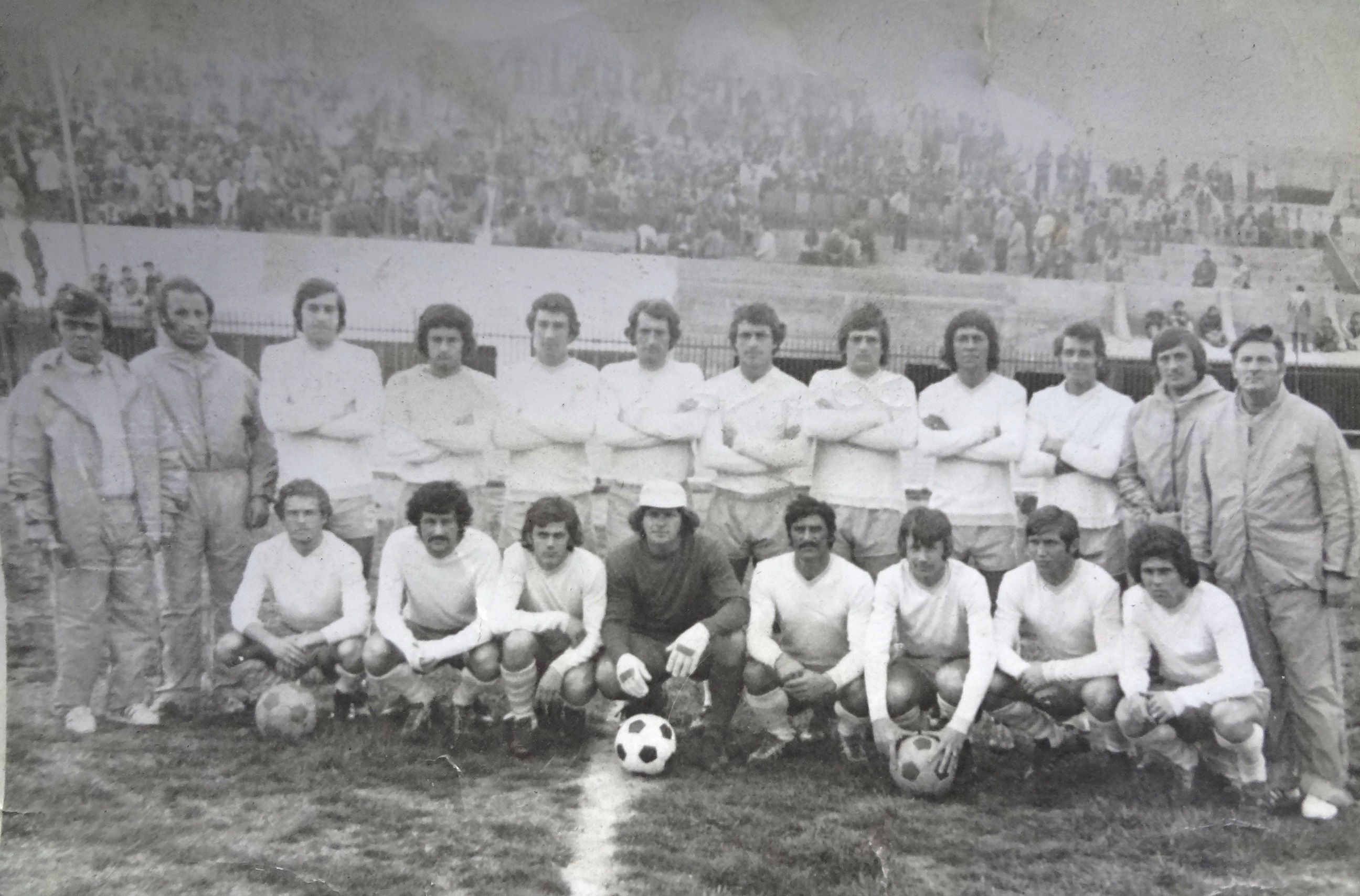 Echipa de fotbal I.C.I.M. Brasov-1978. Fotografie facuta la turneul din Siria/1978:rindul de sus:Cazan(antr.sec.)Mitu(cpt),Funckstein,Tampa,Dan,Luputan,Lie,Arineanu,Ciobanu,Hirlab,Dan,Mateescu C.tin-nea.Dinu(antr.princ);rindul de jos:Serbina,Dobre,Arsenica,Balasz(portar),Albu,Chiala,Nica